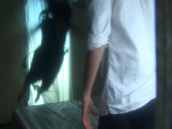 שיר אהבה (2006). כוריאוגרפית ובמאית עמנואלה עמיחי